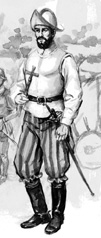 Juan Gomez de Almagro